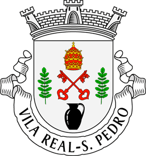 Brasão da freguesia de São Pedro (concelho de Vila Real)